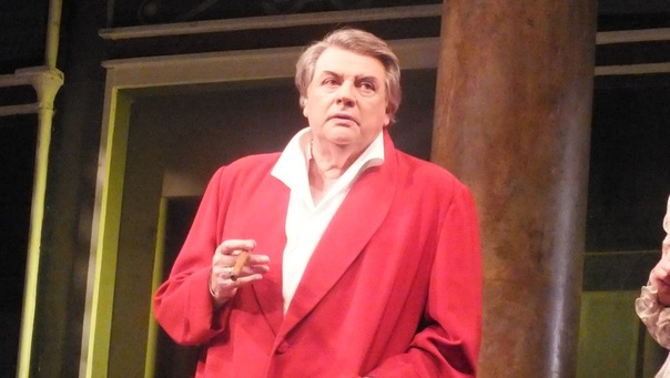 7\1\12,гастроли театра Сатиры в Санкт-Петербурге